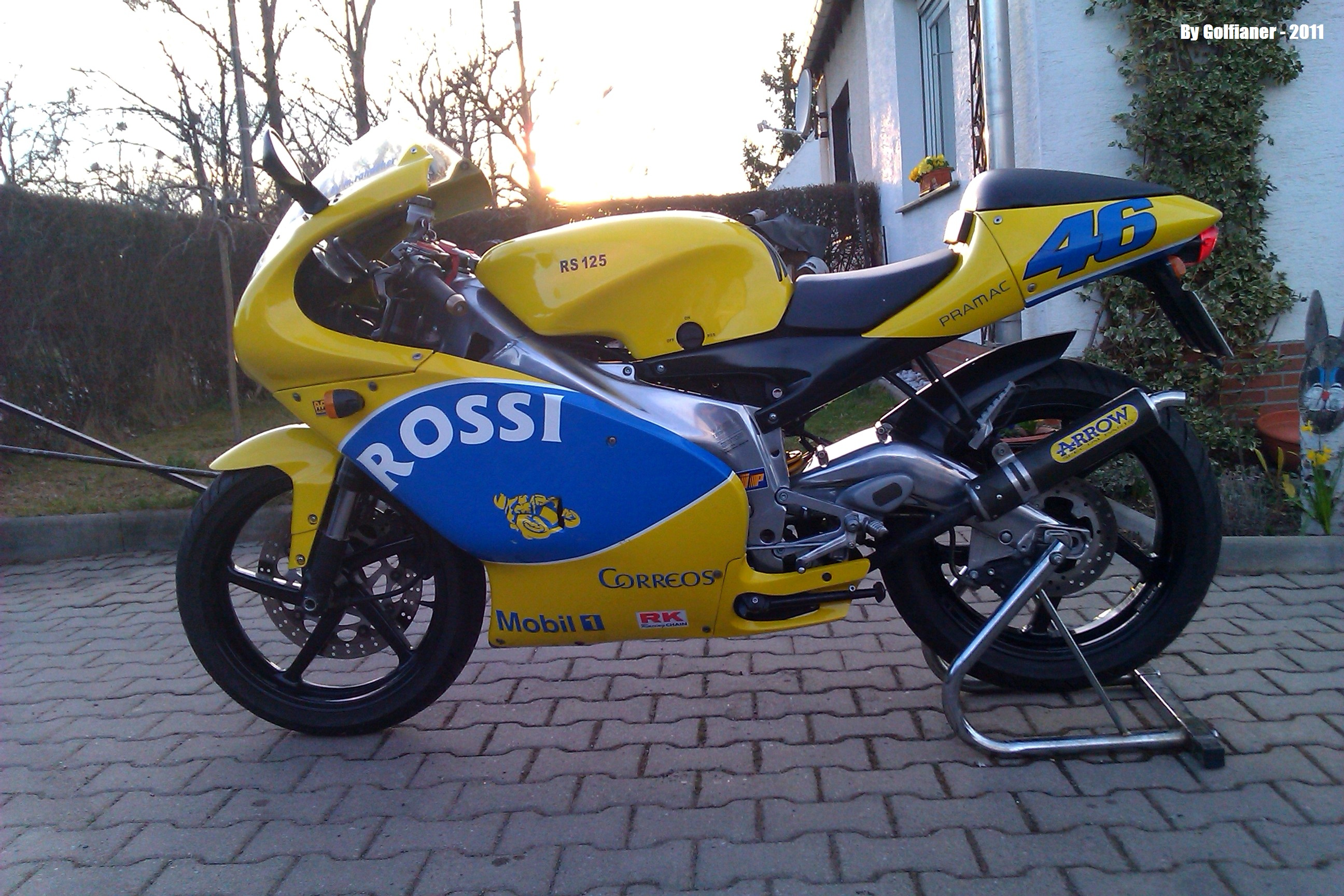 Aprilia RS 125 2002 in Rossi Sonderlackierung ein Einzelstück